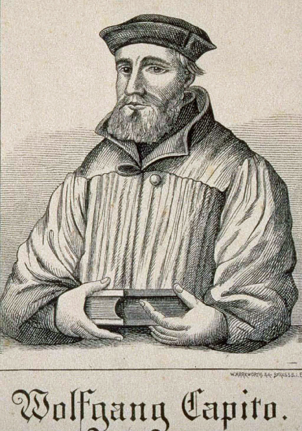 Wolfgang Capito. 1750. Bibliothèque nationale et universitaire de Strasbourg